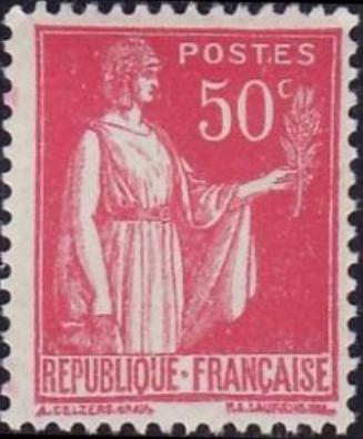 Timbre français au type Paix, valeur de 50 centimes, rose-rouge. Émis le 18 septembre 1932. Design : Paul Albert Laurens (1870-1934) - Graveur : (1873-1943).